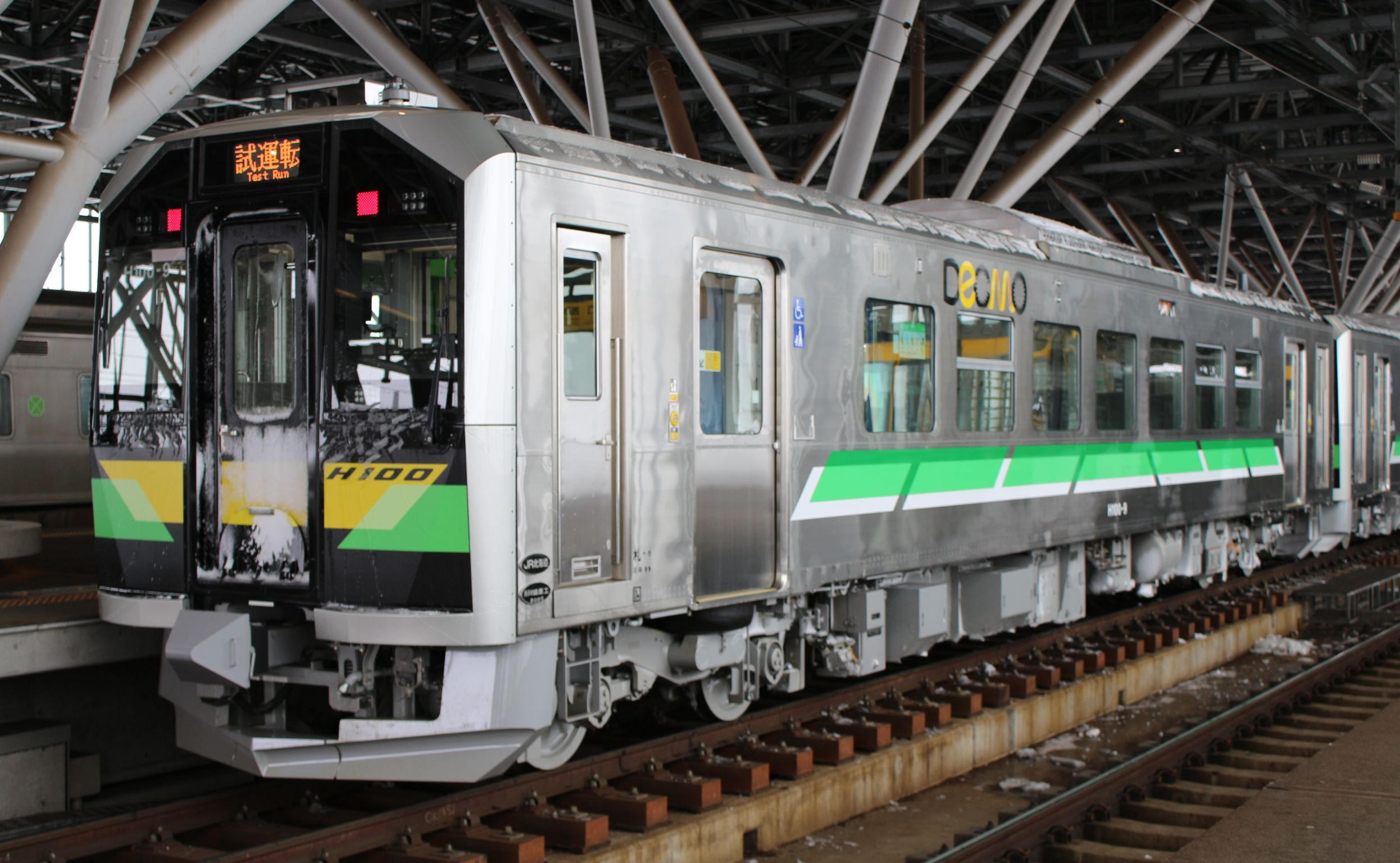 JR北海道 H100形9 試運転 旭川駅にて